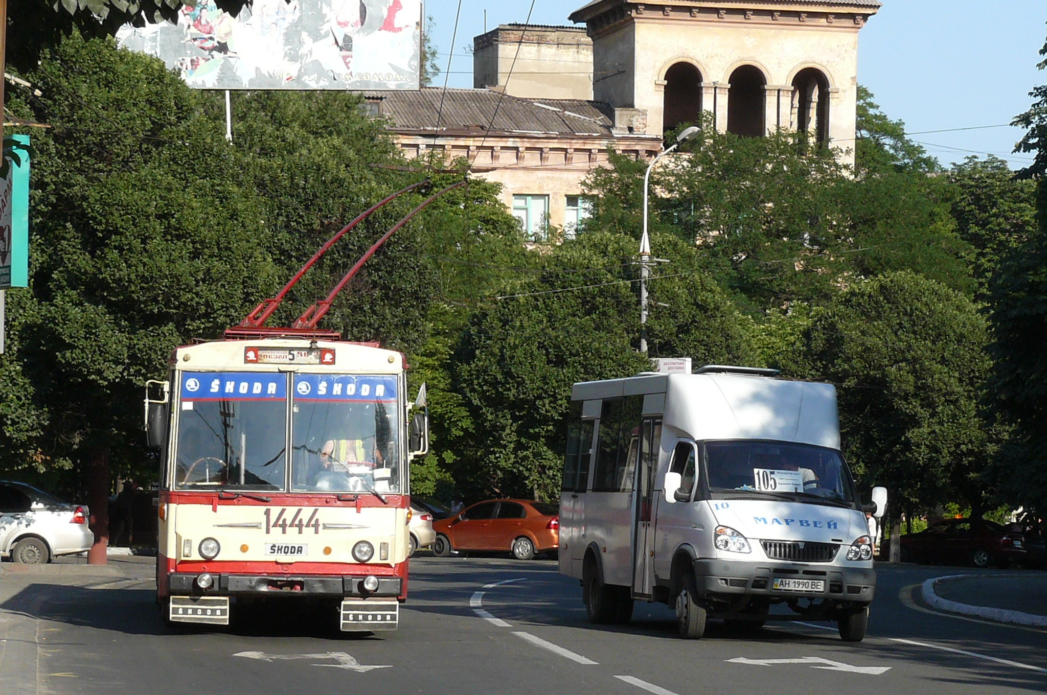 Trolleybuses in Mariupol, juni 2012.